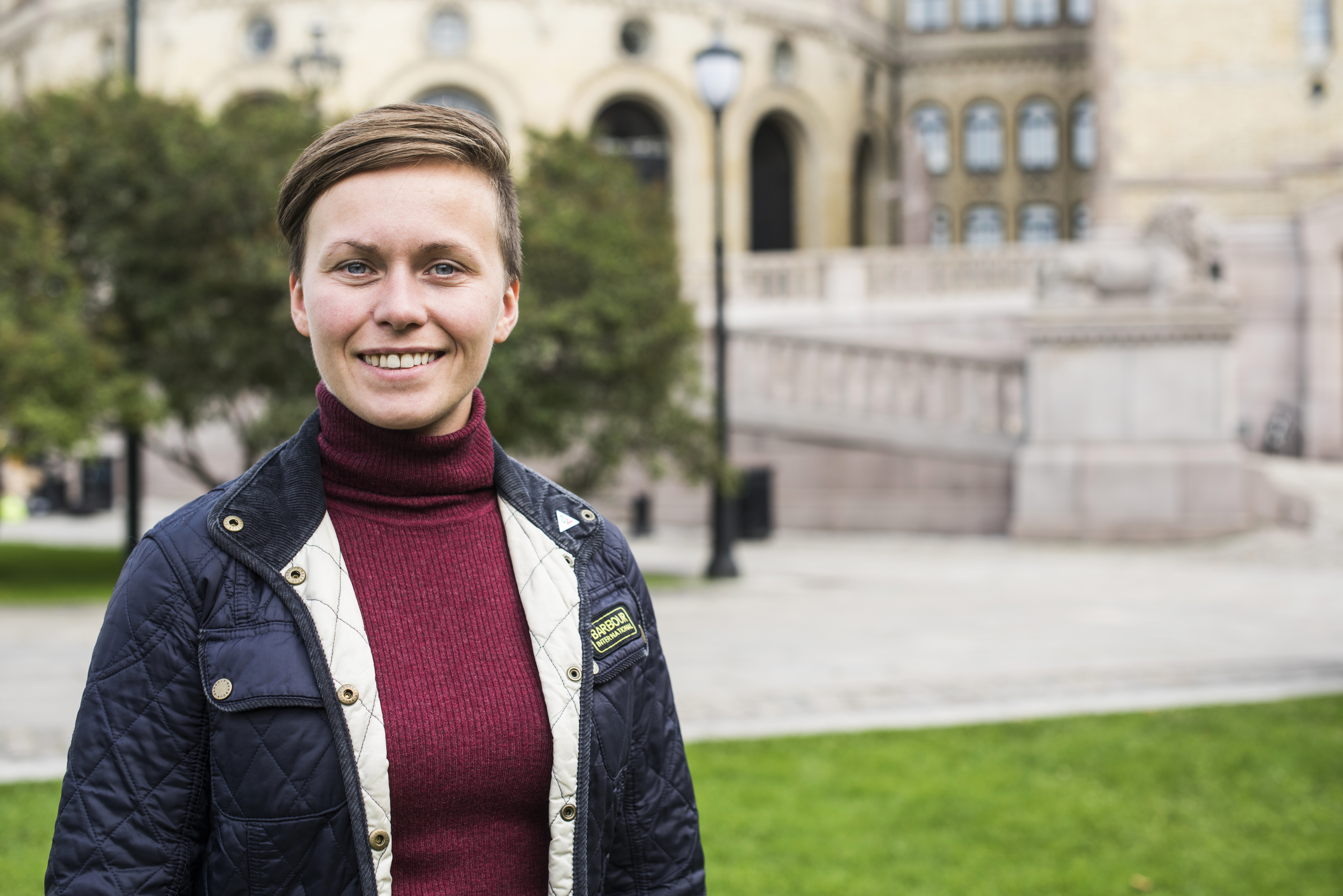 Solfrid Lerbekk